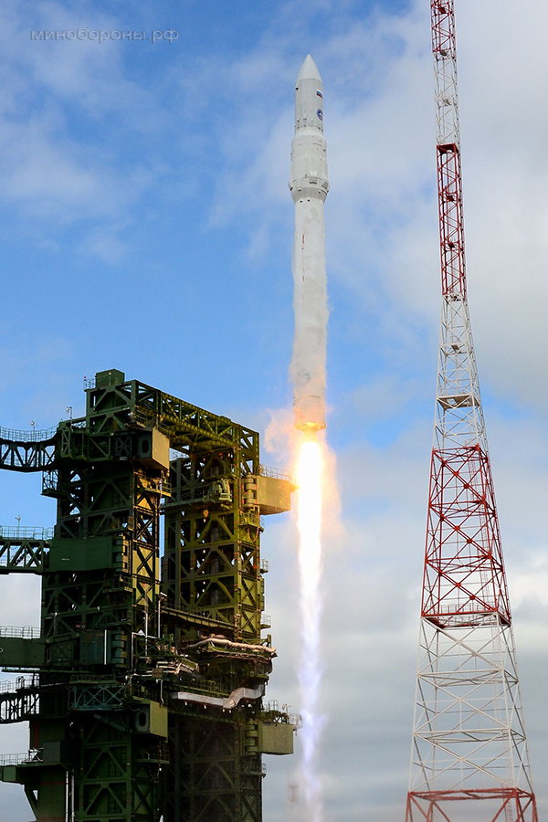 Первый испытательный пуск ракеты-носителя «Ангара-1.2ПП» (ГИК Плесецк, Архангельская обл.)